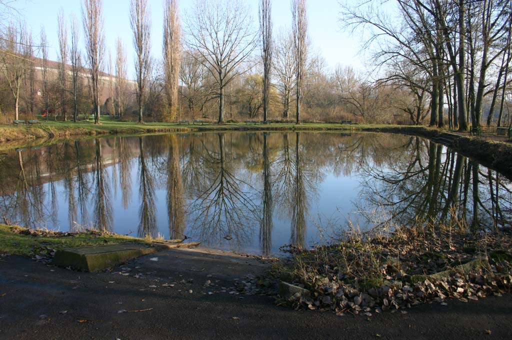 Weiher "Graf-Luckner-Weiher" in Würzburg